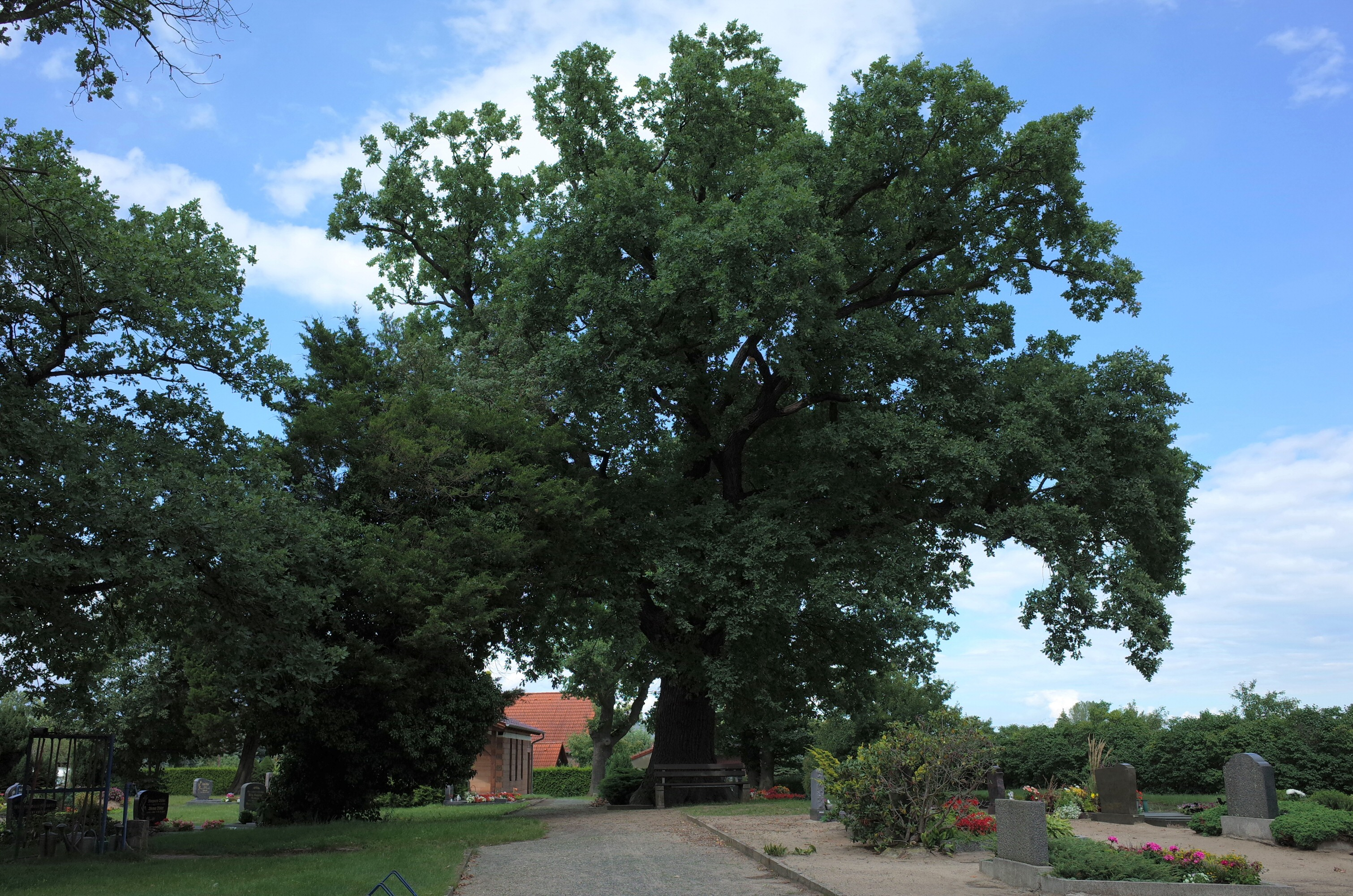 Oranienbaum-Wörlitz, Ortsteil Kakau. Eiche auf dem Friedhof.